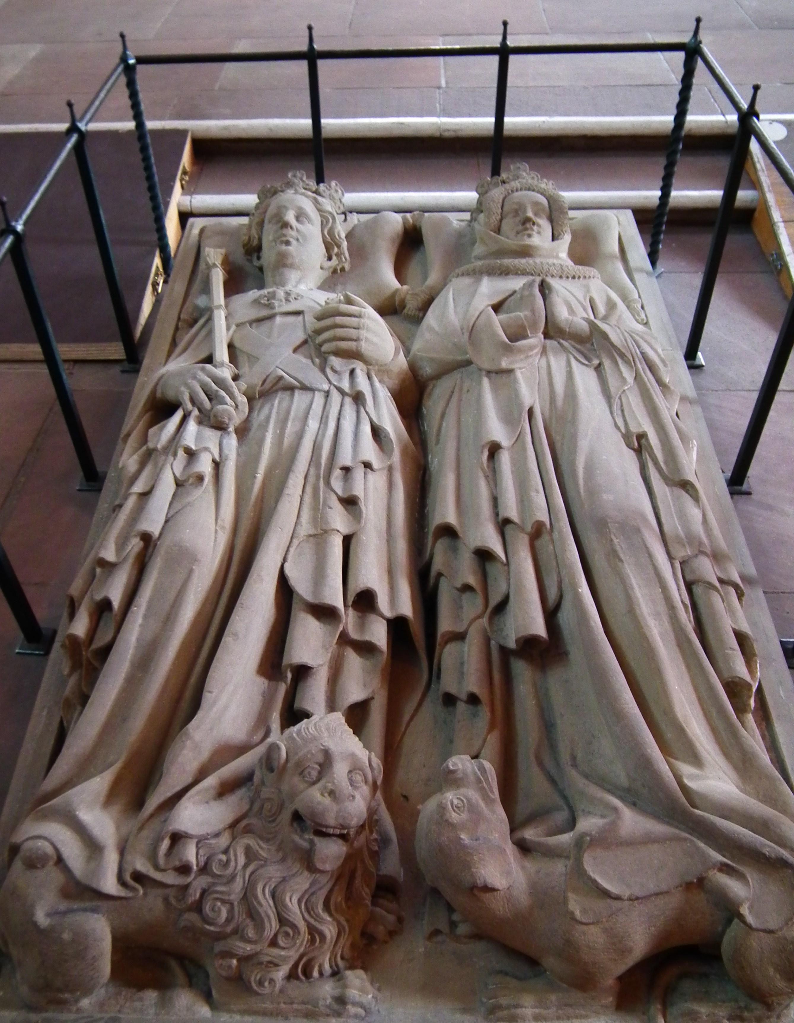 Heiliggeistkirche in der Heidelberger Altstadt (Baden-Württemberg, Deutschland), Epitaph von Kurfürst Ruprecht III. von der Pfalz (als Ruprecht I. auch deutscher König) und Gemahlin Elisabeth von Hohenzollern